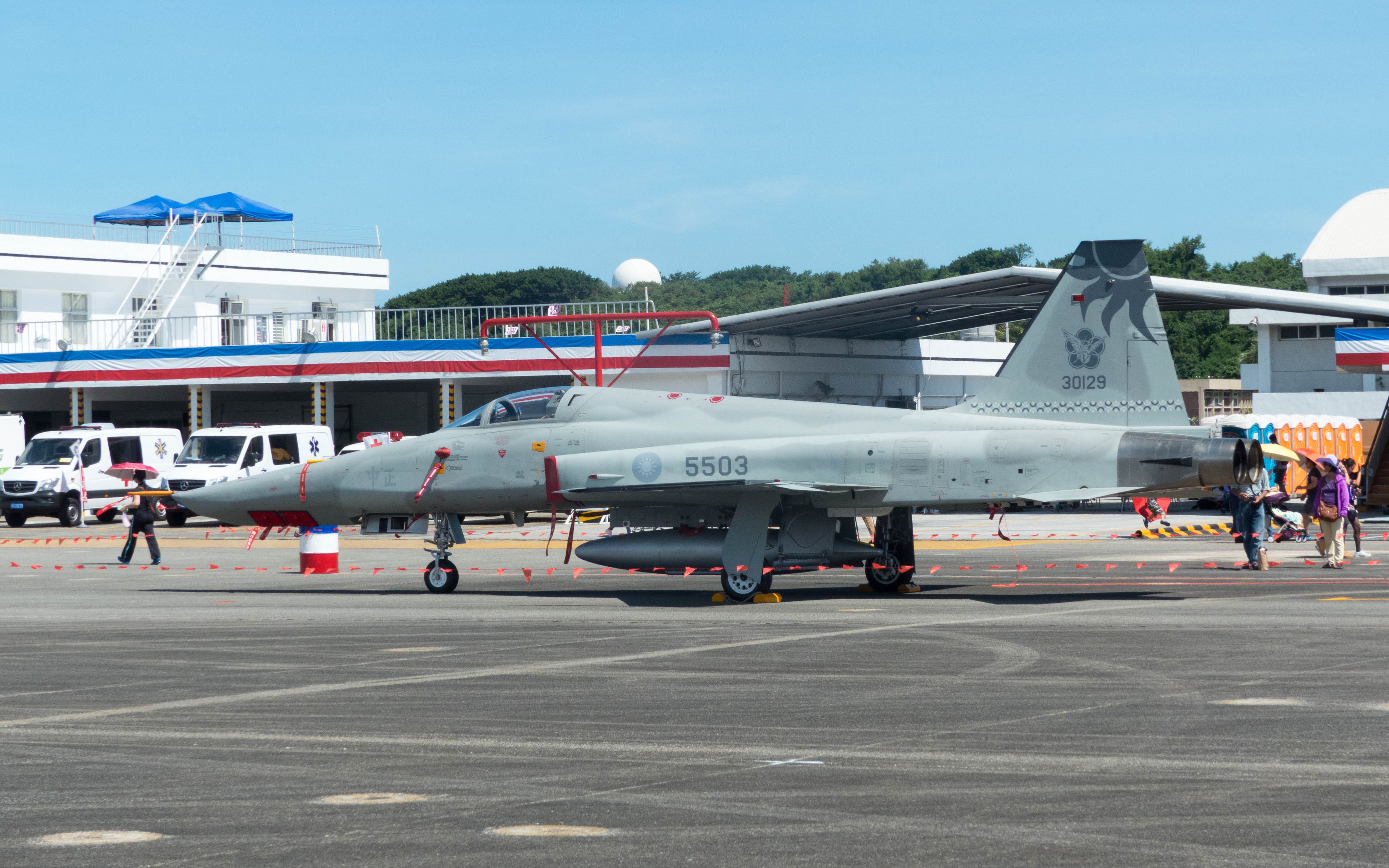 2017年空軍花蓮基地營區開放活動，停機坪靜態展示的401聯隊RF-5E 5503左側。